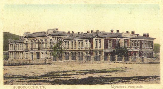 Мужская гимназия в г Новороссийске в 1900 году